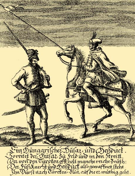 XVII. századi metszet után, Han Alt- und Neu-Pannonien (Nürnberg, 1686.) cz. munkájából. Aláirása: Ein Hungarischer Husar und Henduck. So reitet der Husar zu Feld und in den Streitt, | Der von den Türcken offl holt manche reiche Beuth : | Der Fuß-knecht und Henduck also gewaffnet steht, | Ihn Durst nach Türcken-Blut, auf die er muthig geht.